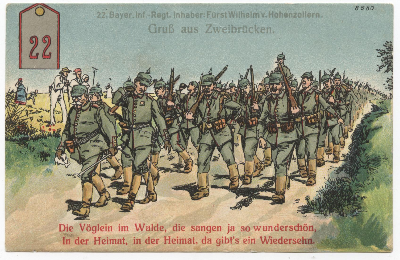 Postkarte vom 22. Kgl. Bay. Inf. Rgt. in Zweibrücken.